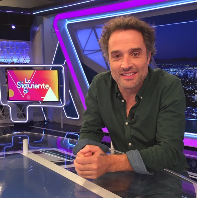 Daniel Guzmán en el programa de Lo Siguiente de TVE.